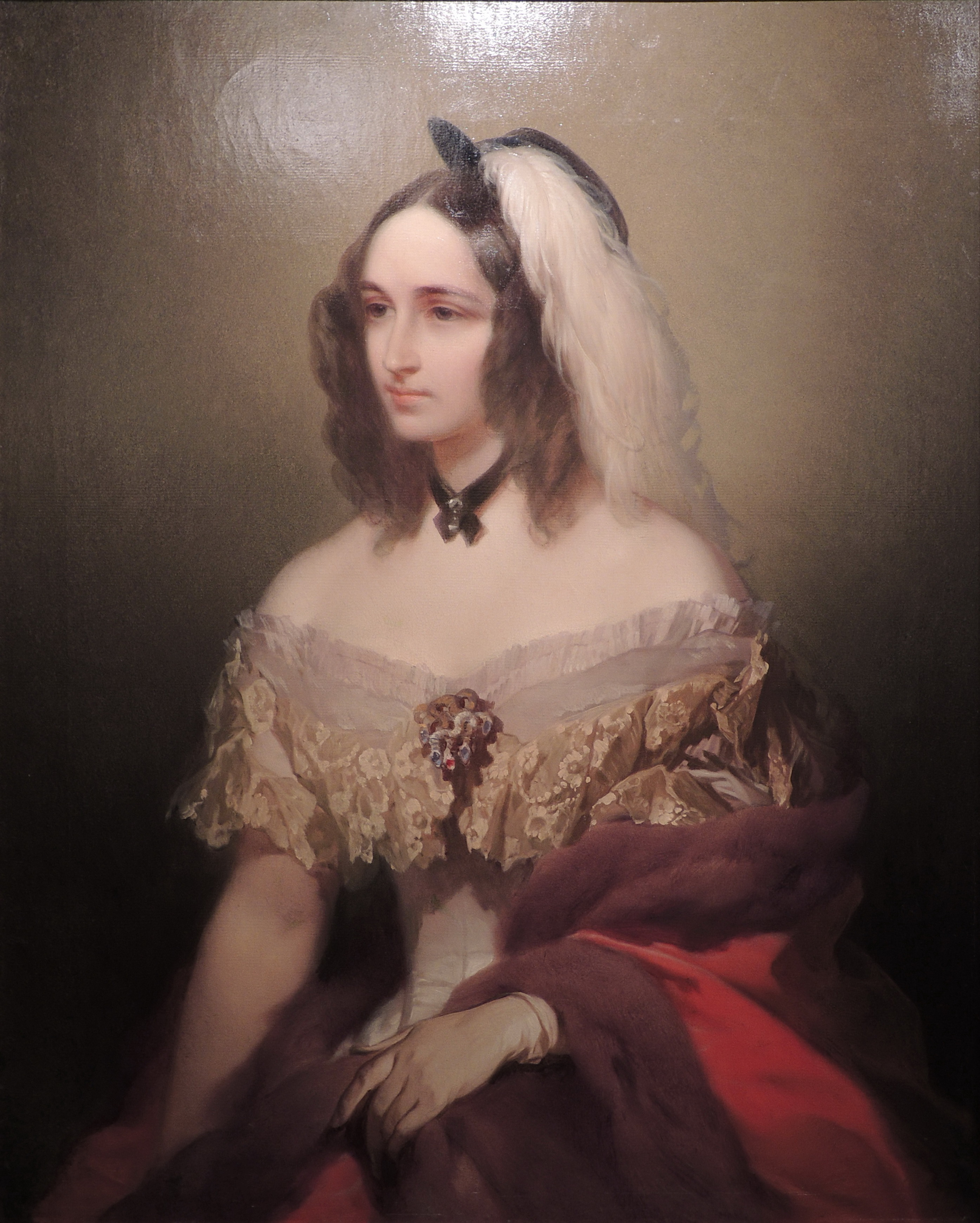 «Знакомцы давние». Иван Макаров.